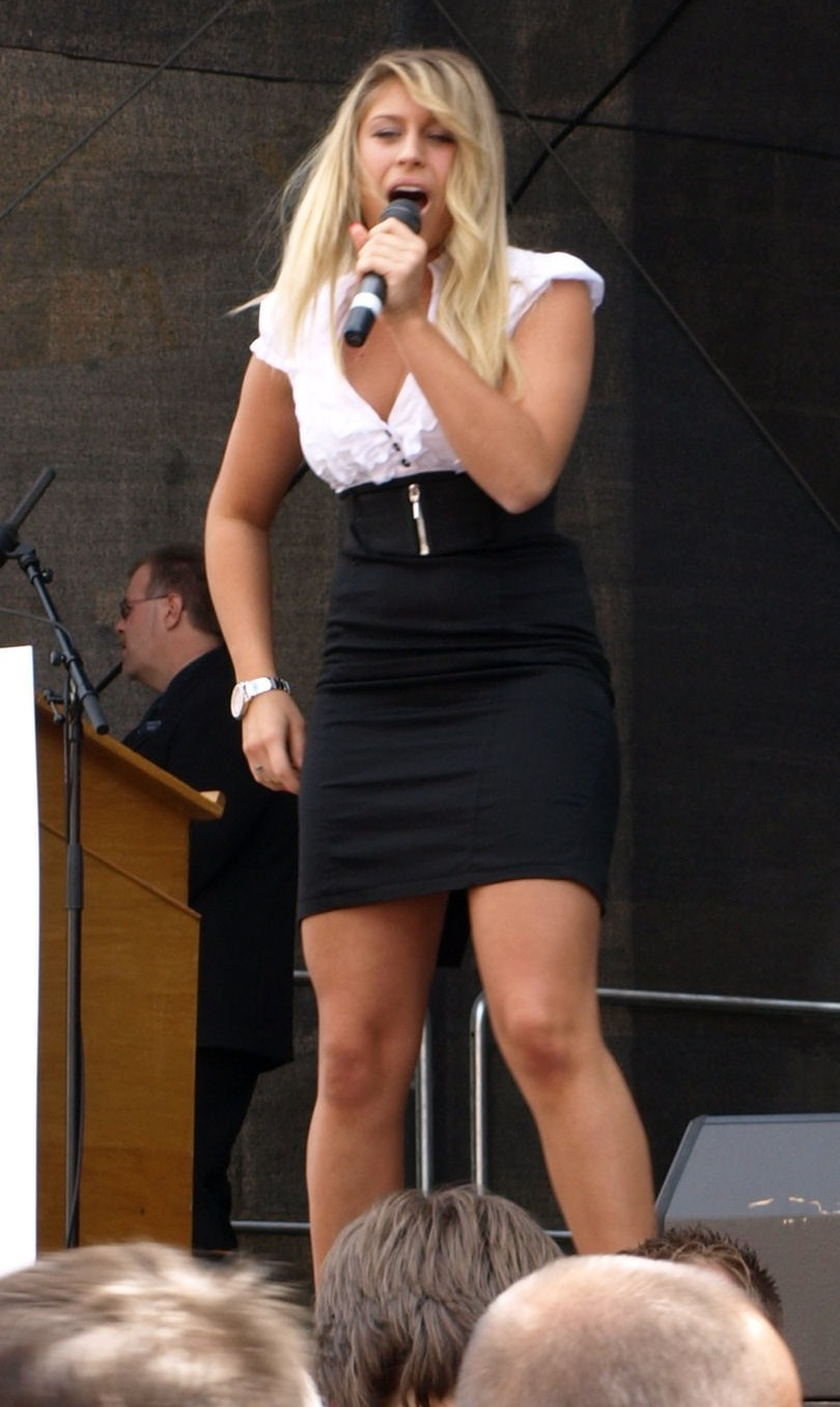 Linda Teodosiu beim Tag der Niedersachsen 2009 in Hameln.